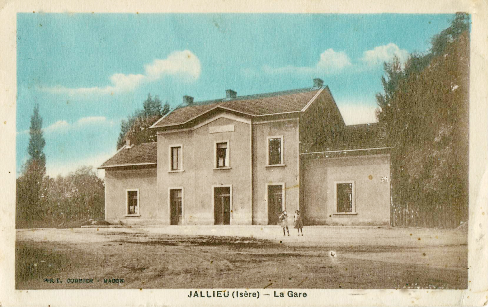 Carte postale ancienne éditée par Combier JALLIEU (Isère) : La Gare Il s'agit de la gare du Chemin de fer de l'Est de Lyon